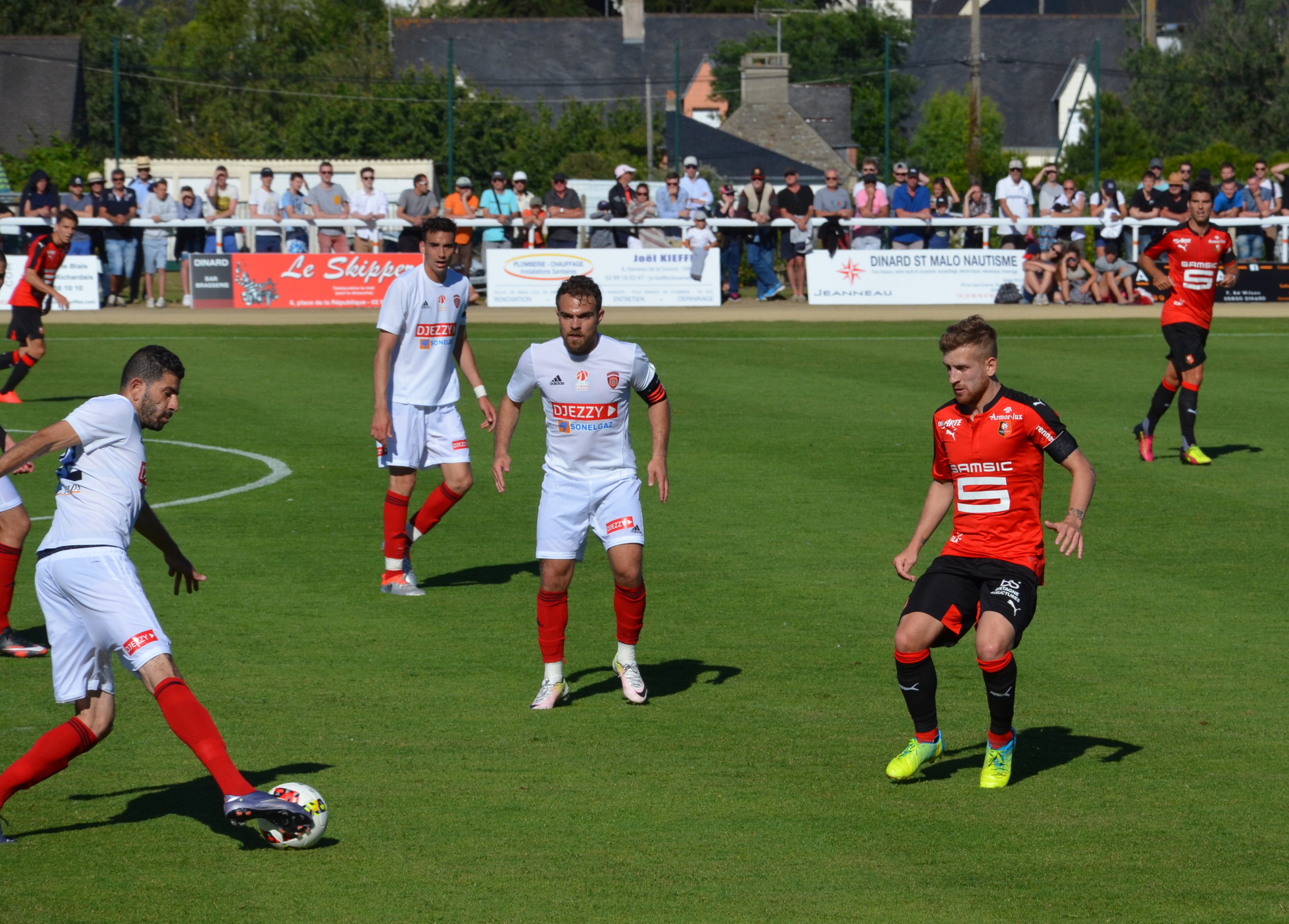 Photographie prise lors du match opposant le Stade rennais à l'USM Alger en match amical au stade Paul-Audrin de Dinard le 16 juillet 2016. Ici, Mohamed Meftah balle au pied, face à Pedro Henrique.